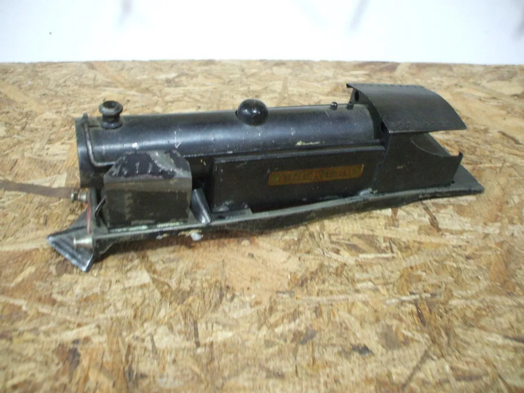 Carcasa de locomotora marca Elektro